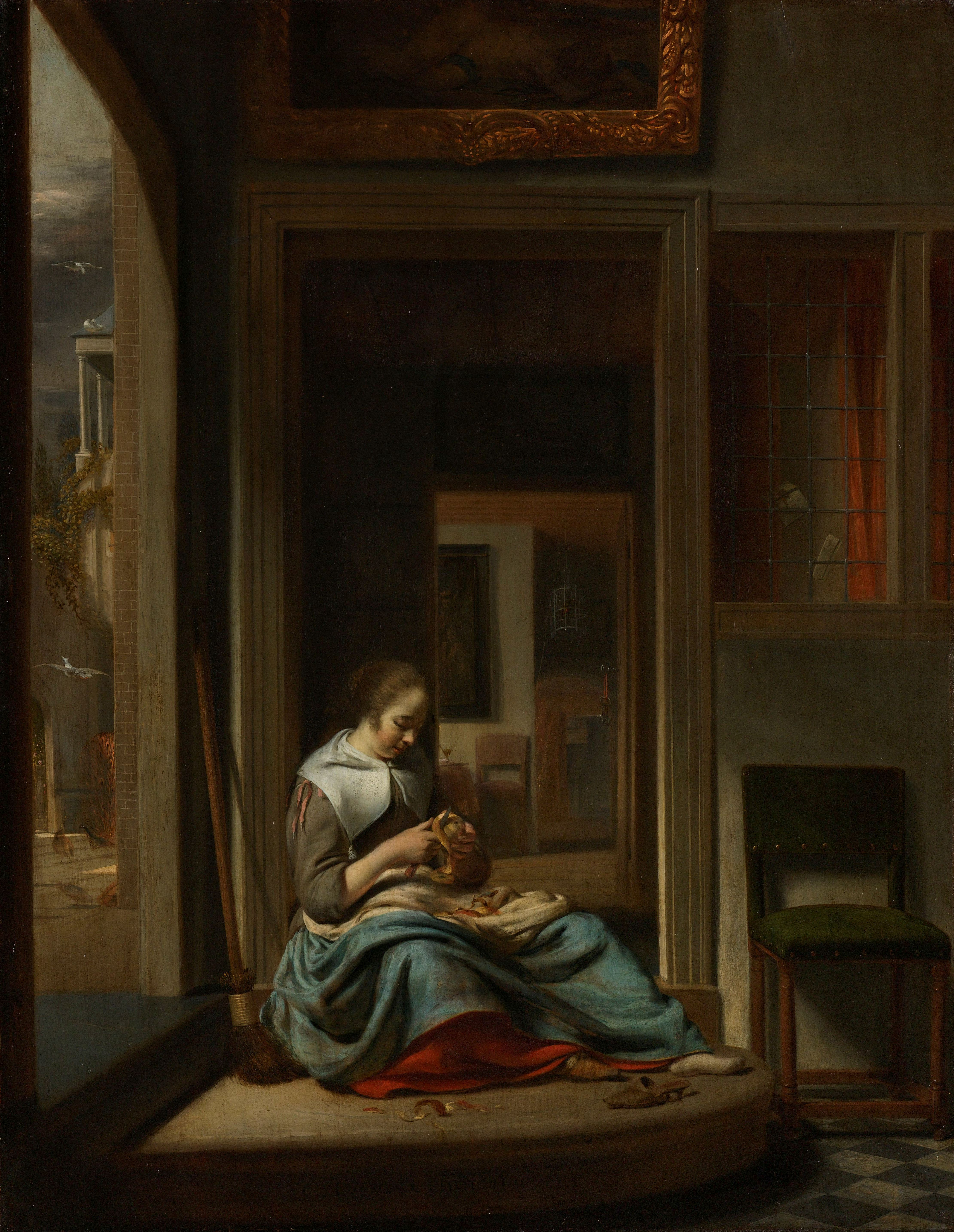 De appelschilster. Interieur met een vrouw, een dienstmeid, die voor de deur zit en appels schilt. In het interieur zijn twee schilderijen zichtbaar en in de verte een vogelkooi.